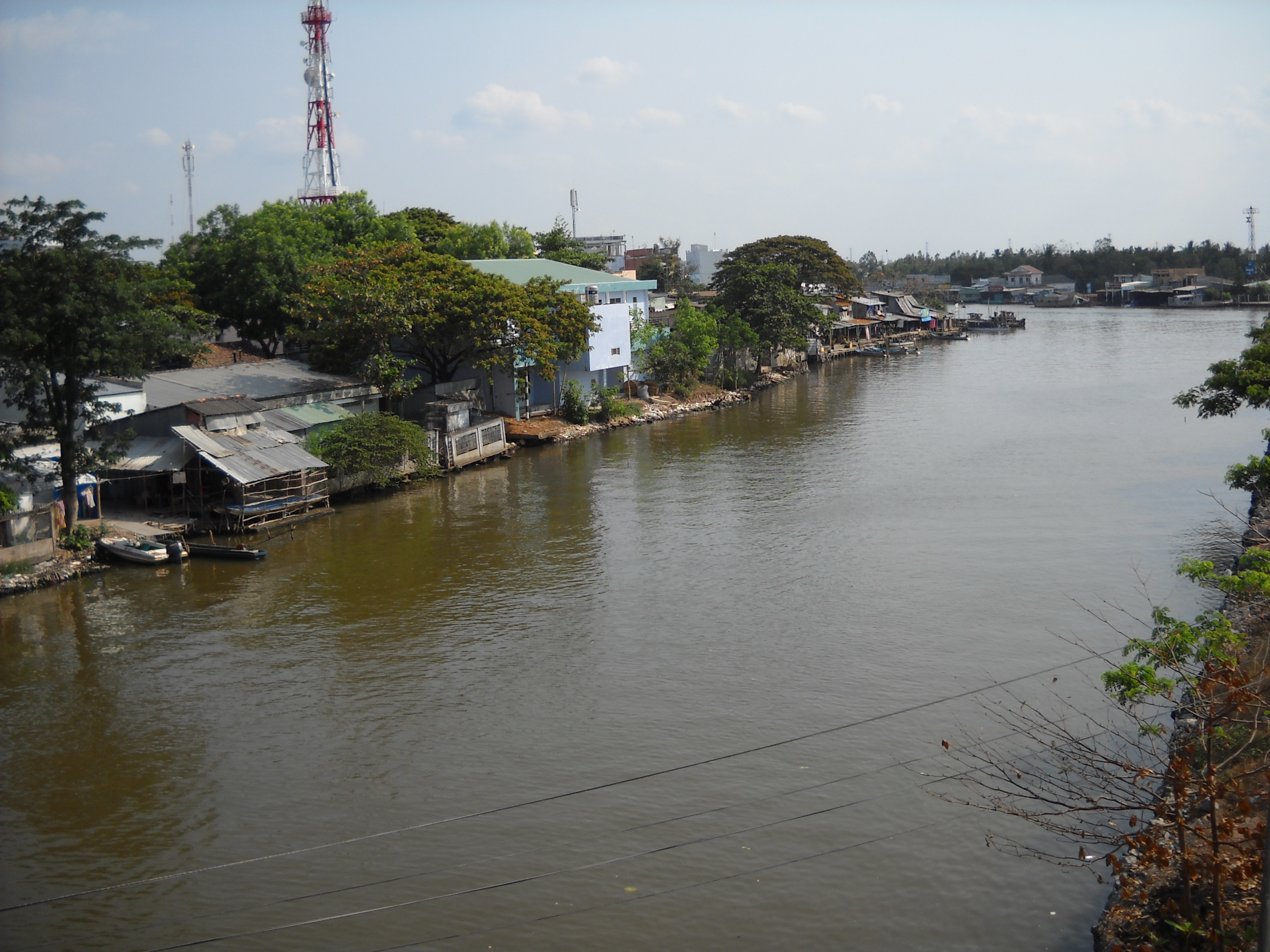 Thới Bình là một huyện nằm ở Đông Bắc tỉnh Cà Mau, đồng bằng sông Cửu Long, Việt Nam.